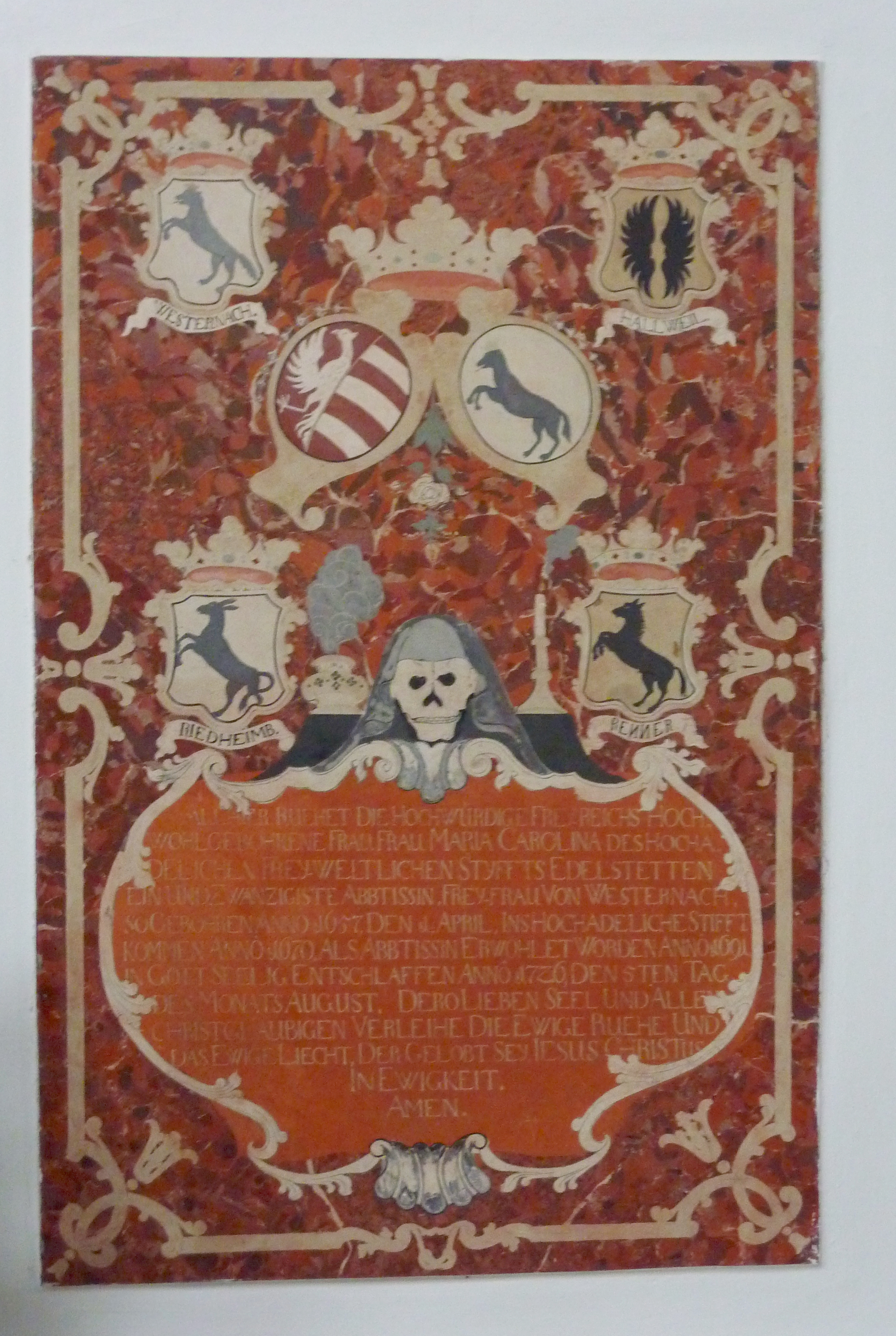 Ehemalige Damenstiftskirche, katholische Pfarrkirche St. Johannes Baptist und Johannes Evangelist in Edelstetten in der Gemeinde Neuburg an der Kammel im Landkreis Günzburg (Bayern), Grabplatte in Scagliola-Technik für Maria Carolina von Westernach, Äbtissin von 1691 bis 1726